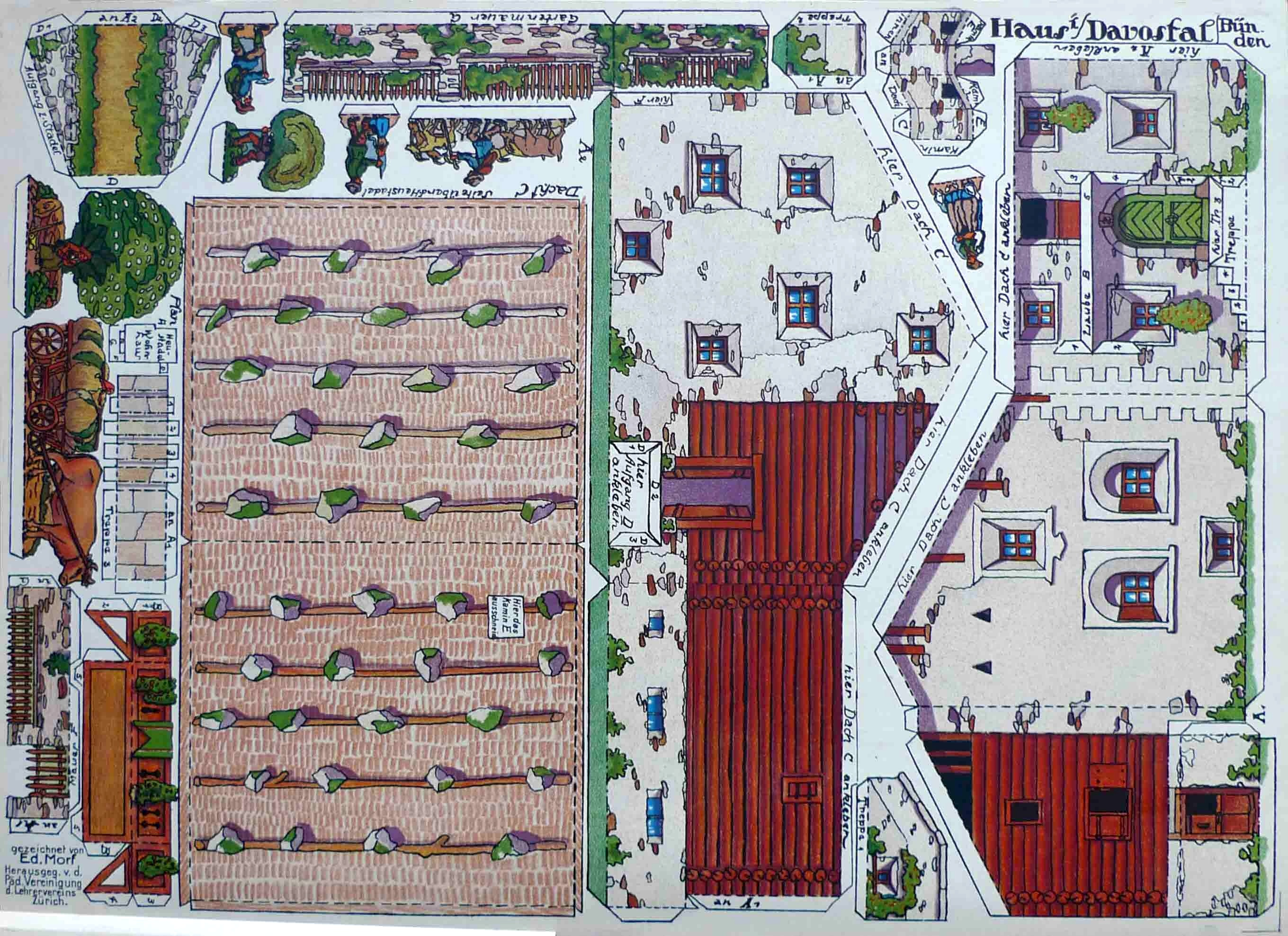 Kartonmodell eines Bauernhauses aus Davos, das erste Modell des Verlages Pädagogischer Verlag des Lehrerinnen- und Lehrervereins Zürich, hergestellt von Edwin Morf